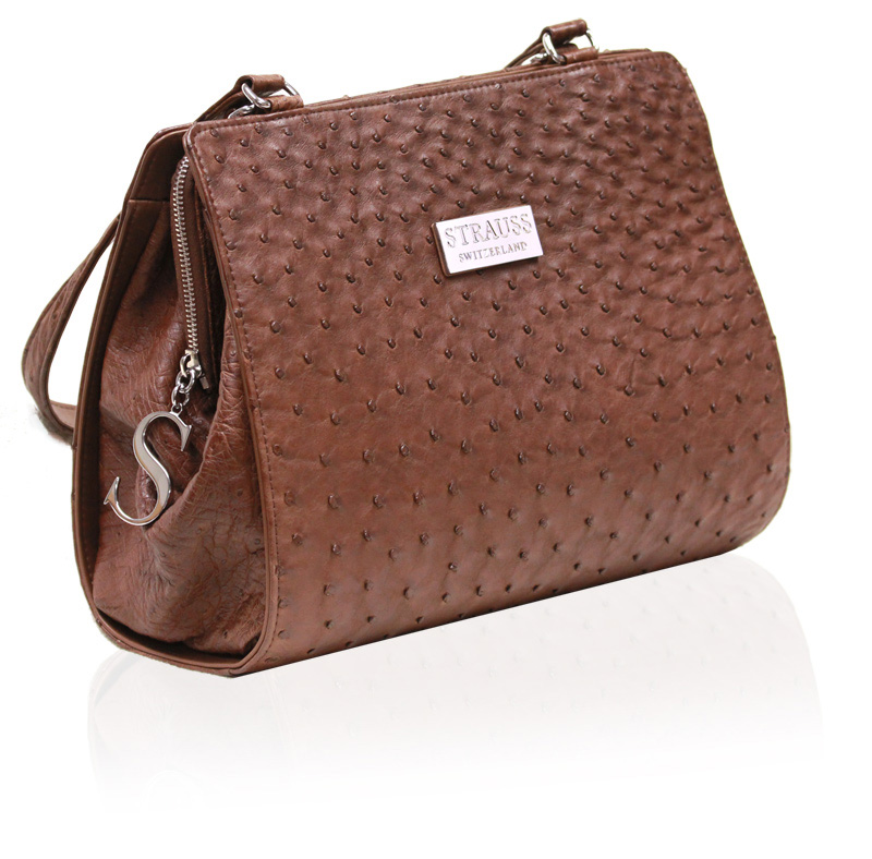 Die kleinere Handtasche «Classic» ist in vielen Farben erhältlich.